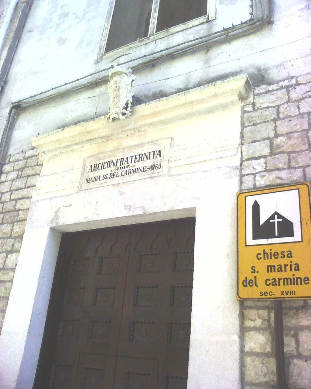 chiesa del carmine-modugno